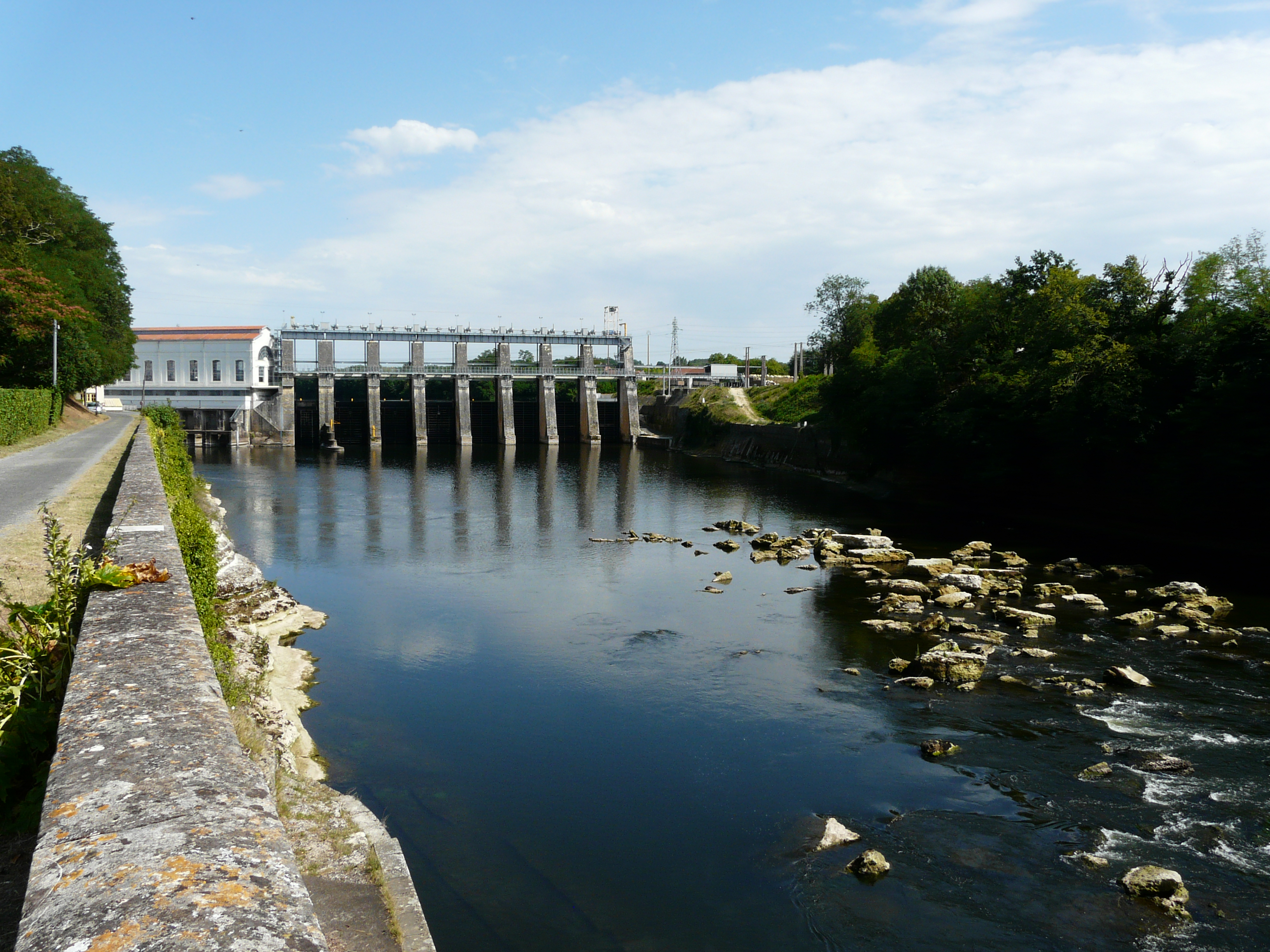 L'usine hydroélectrique (à gauche) et le barrage de Tuilières sur la Dordogne, Saint-Capraise-de-Lalinde et Saint-Agne, Dordogne, France.